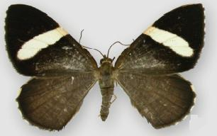 Hagnagora elianne